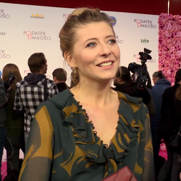 Polska aktorka Anna Smołowik na premierze filmu "Podatek od miłości", styczeń 2018.